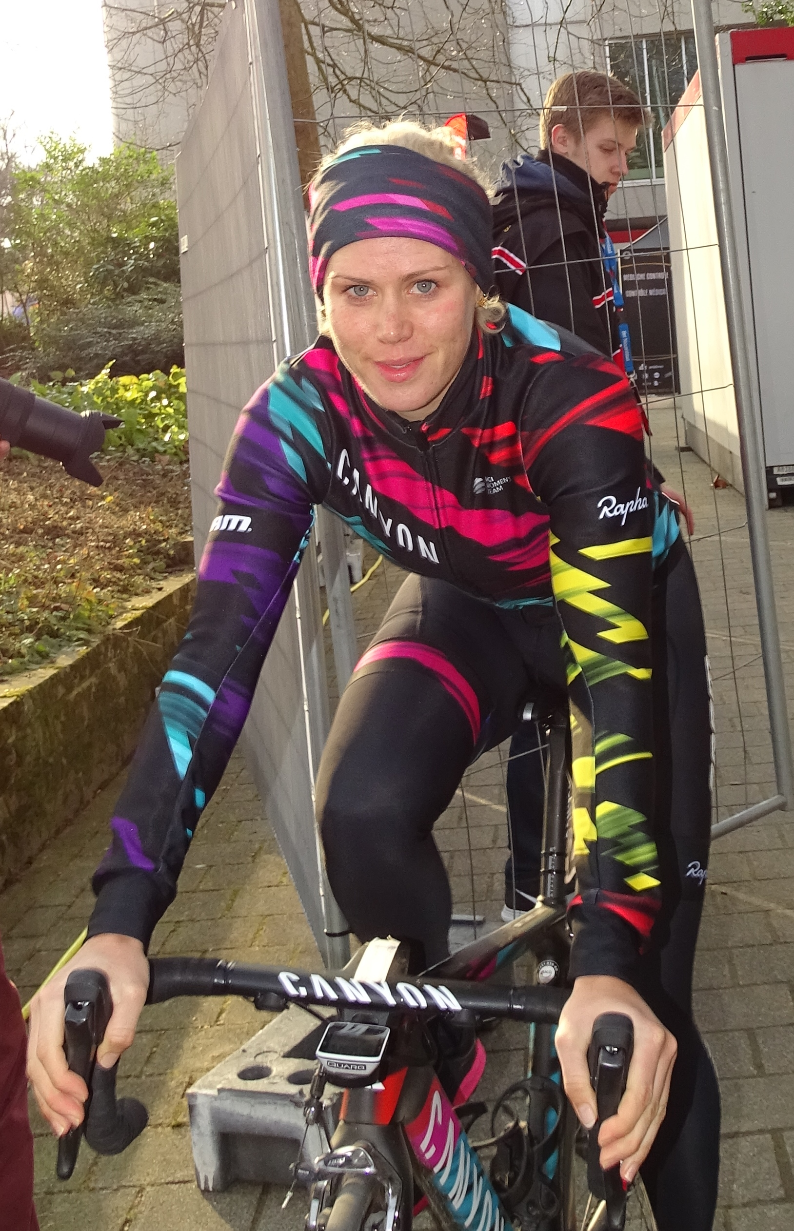 Reportage réalisé le samedi 27 février à l'occasion du départ et de l'arrivée du Circuit Het Nieuwsblad 2016 et de l'arrivée du Circuit Het Nieuwsblad féminin 2016 à Gand, Belgique.